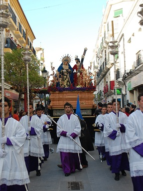 Nuestros Padre Jesús de los Afligidos y María Santísima de los Desconsuelos